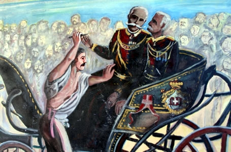 Detalhe do mural público em Sabóia di Lucania mostrando a tentativa de assassinato de Giovanni Passannante a Umberto I.